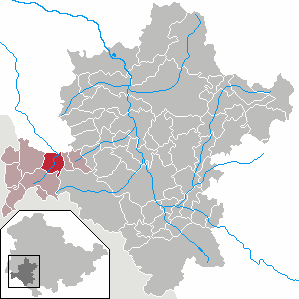 Kaltensundheim in Thuringia - District Schmalkalden-Meiningen